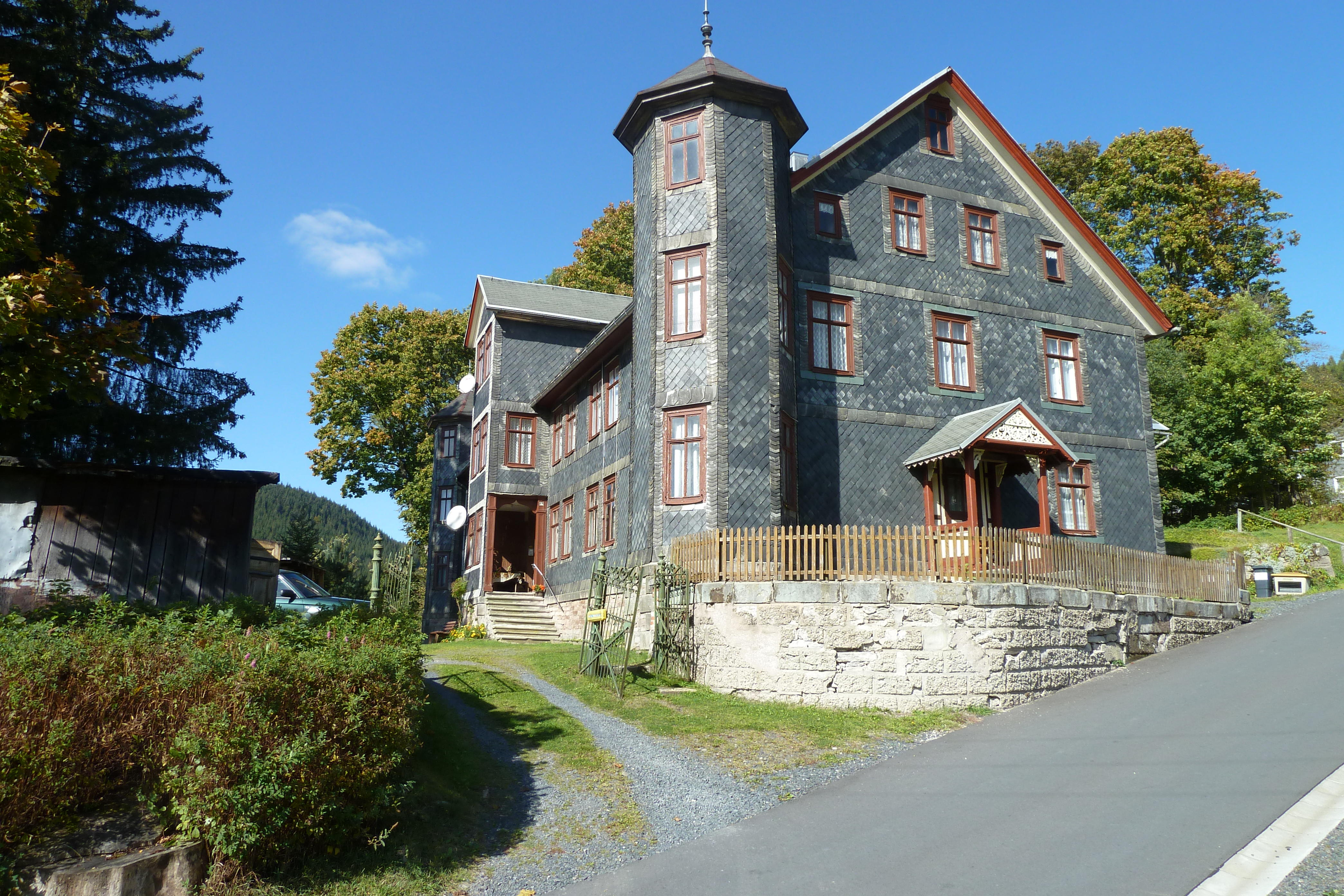 Herrenhaus Hohenofener Str. 1 in Hohenofen, OT von Oberland am Rennsteig, Landkreis Sonneberg